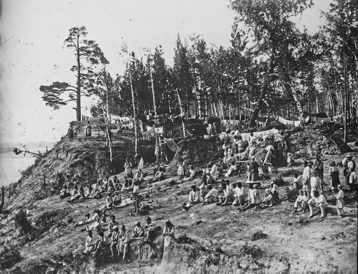 Переселенцы в Кривощёково. Снимок из архива барона де Бай и использован в его книге «От Пензы до Минусинска»